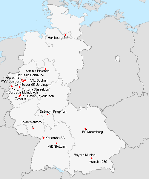 Répartition des clubs en 1.Bundesliga 1980-1981.